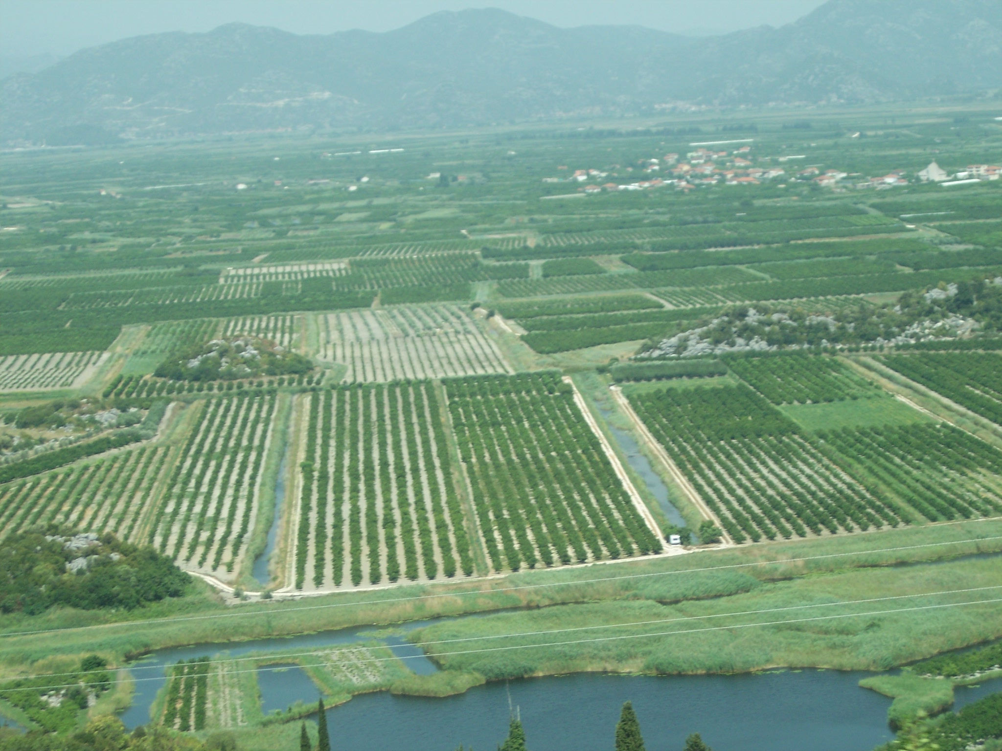 Agriculture near river Neretva in Croatia